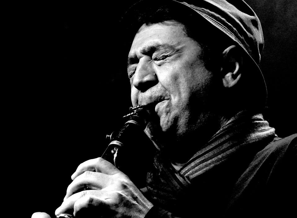 концерт в Ереване